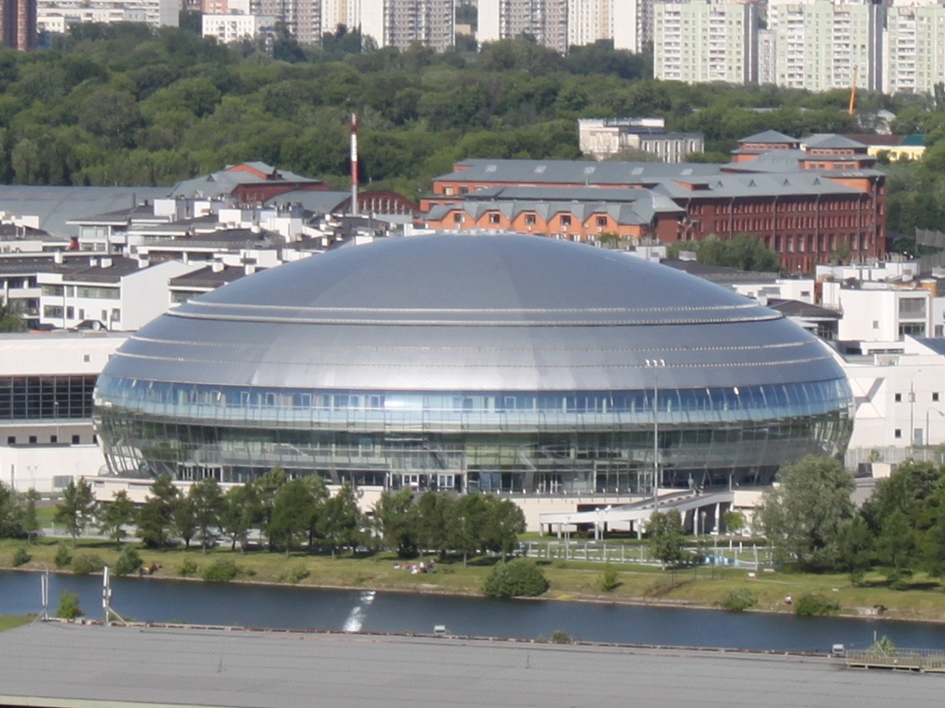 Дворец спорта Крылатское, фотография для карточки